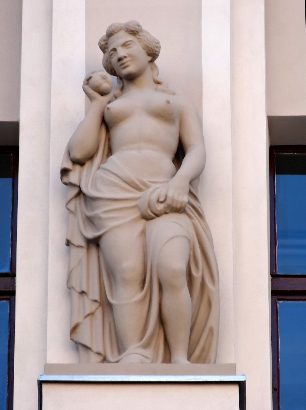 Dom Towarowy Jedynak, ul. Gdańska 15 w Bydgoszczy (zbud. 1910)